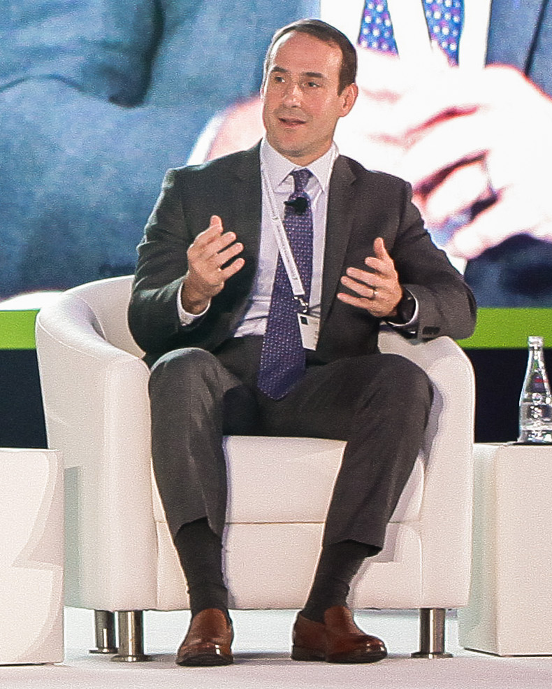 Dan Richards, CEO, Global Rescue